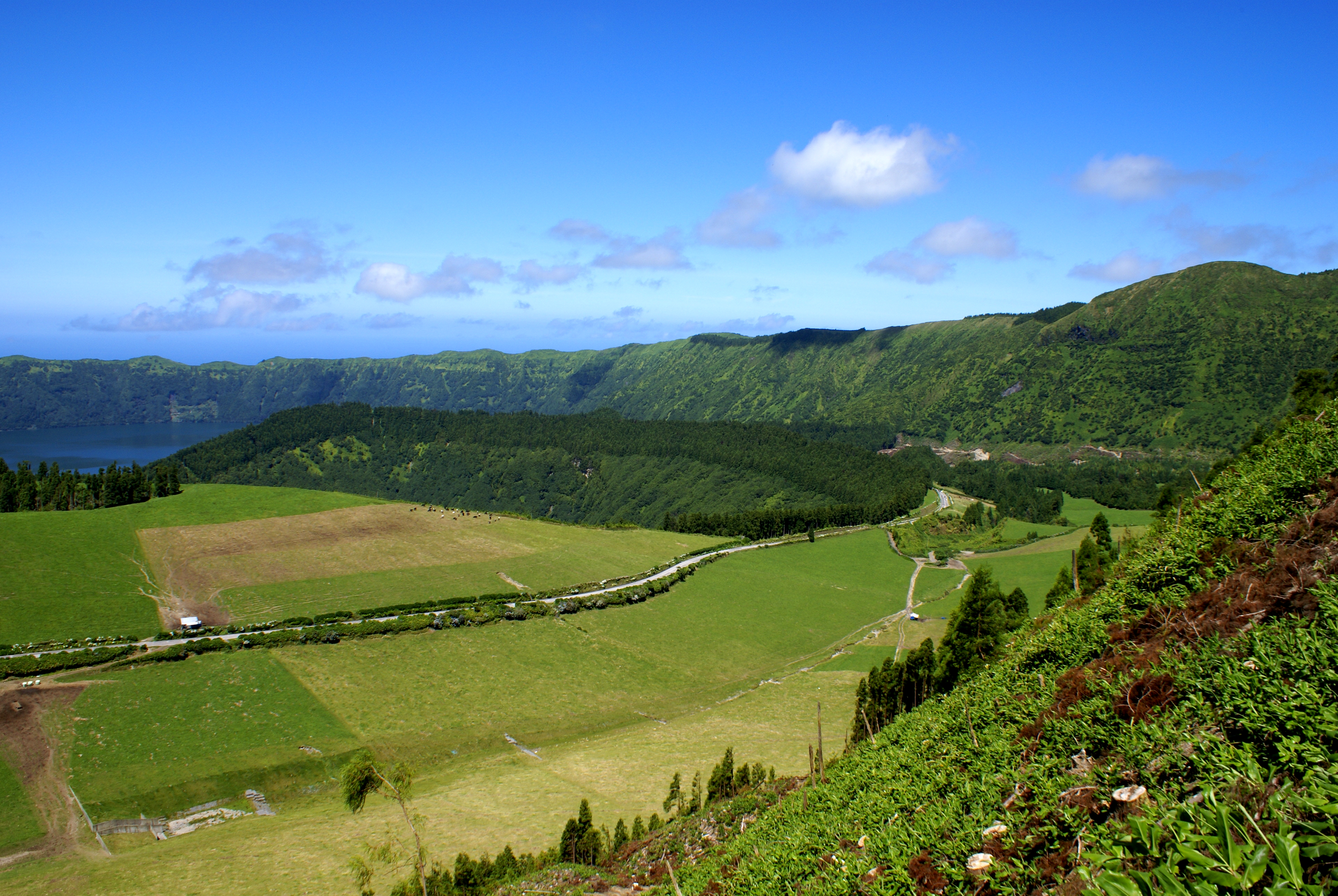 Zona das Sete Cidades, Miradouro do Pico do Carvão, Ponta Delgada, ilha de São Miguel, Açores